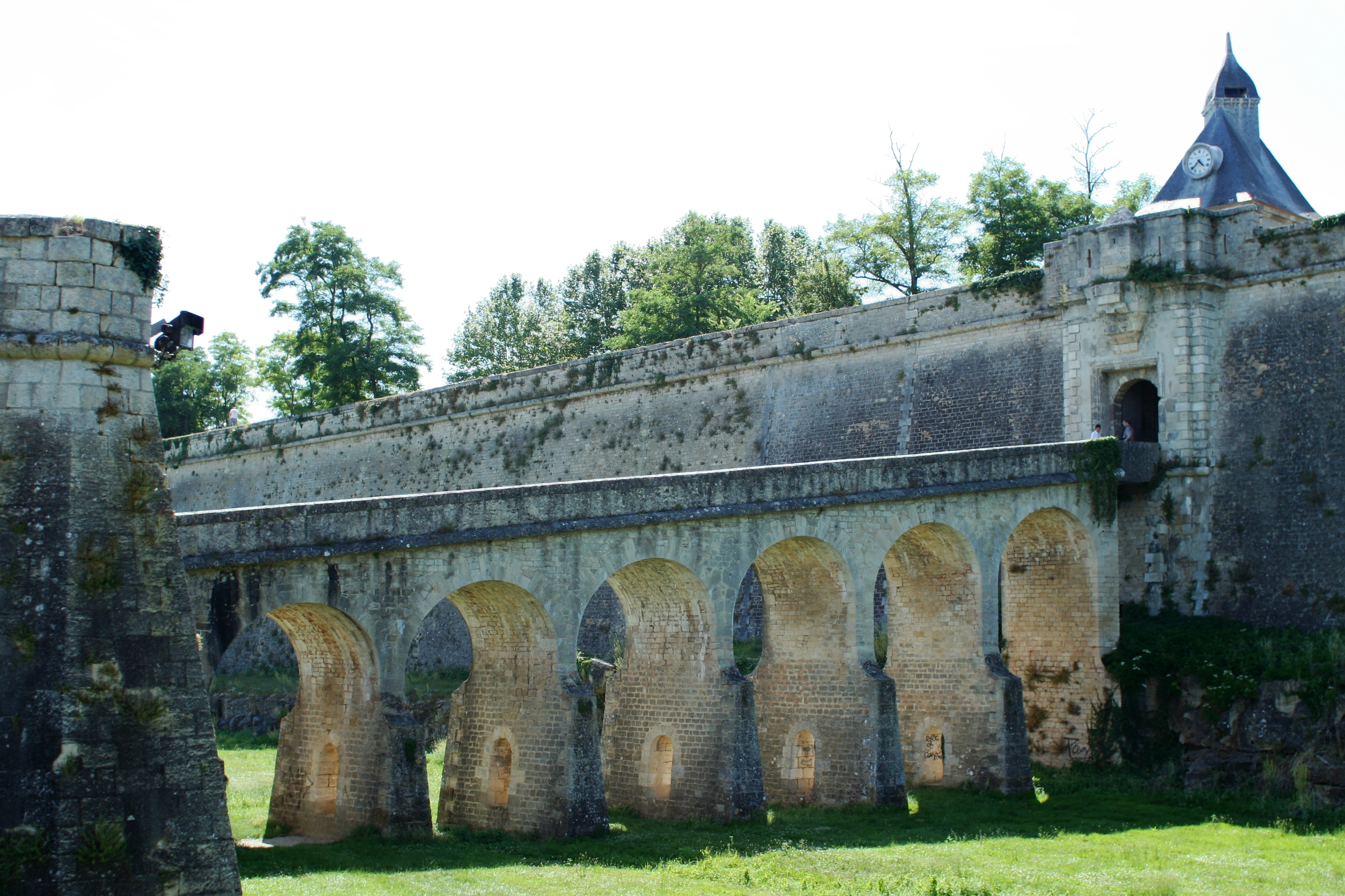 Citadelle de Blaye, pont de la porte Dauphine.